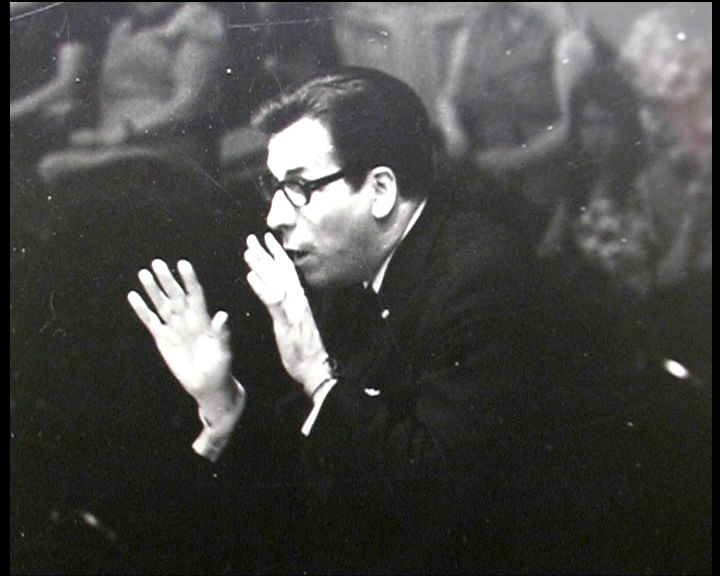 Mariakörens och Västers domkyrkas gosskörs grundare och första dirigent Bror Samuelson (1919-2008)